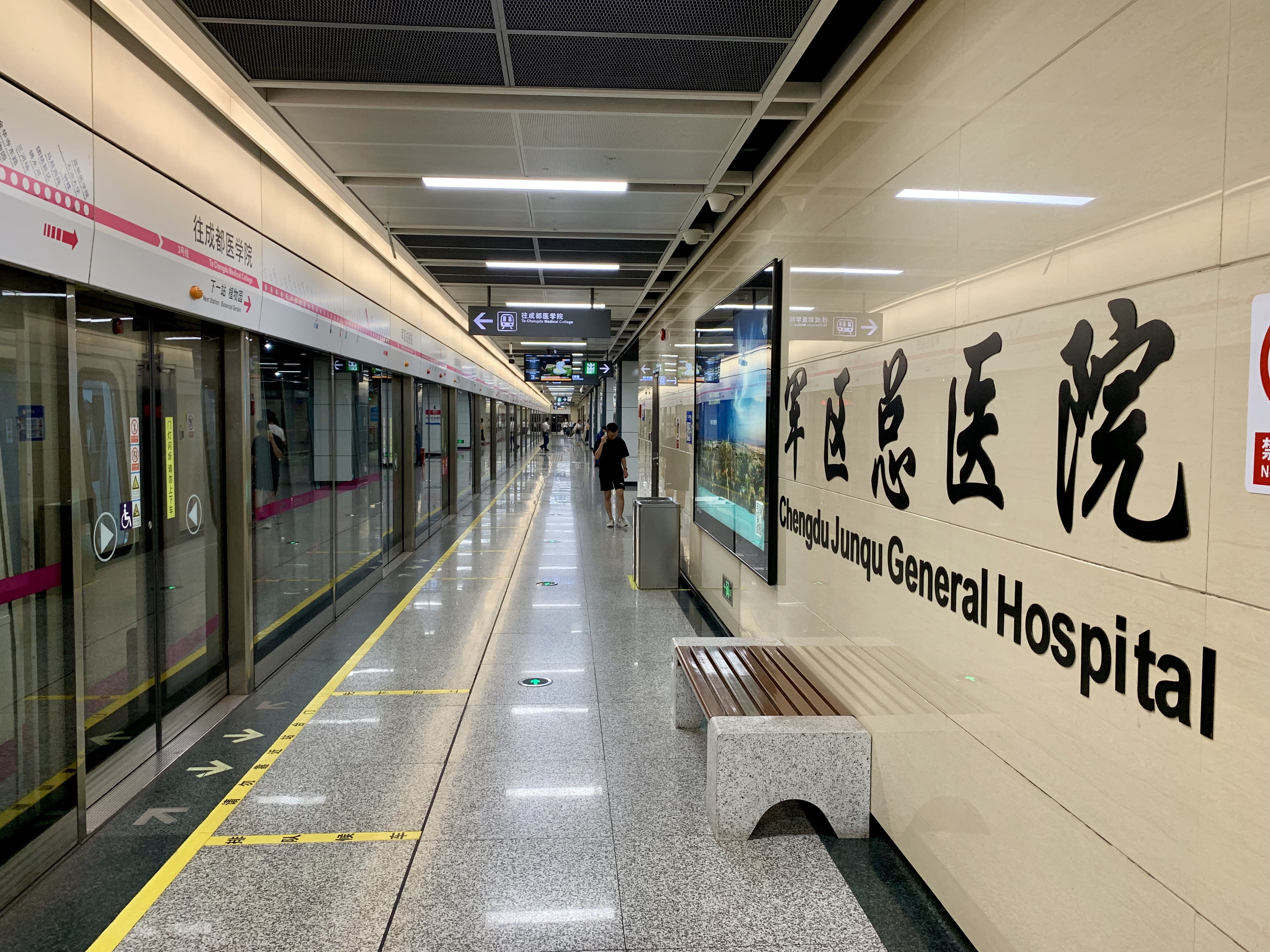 成都地铁军区总医院站